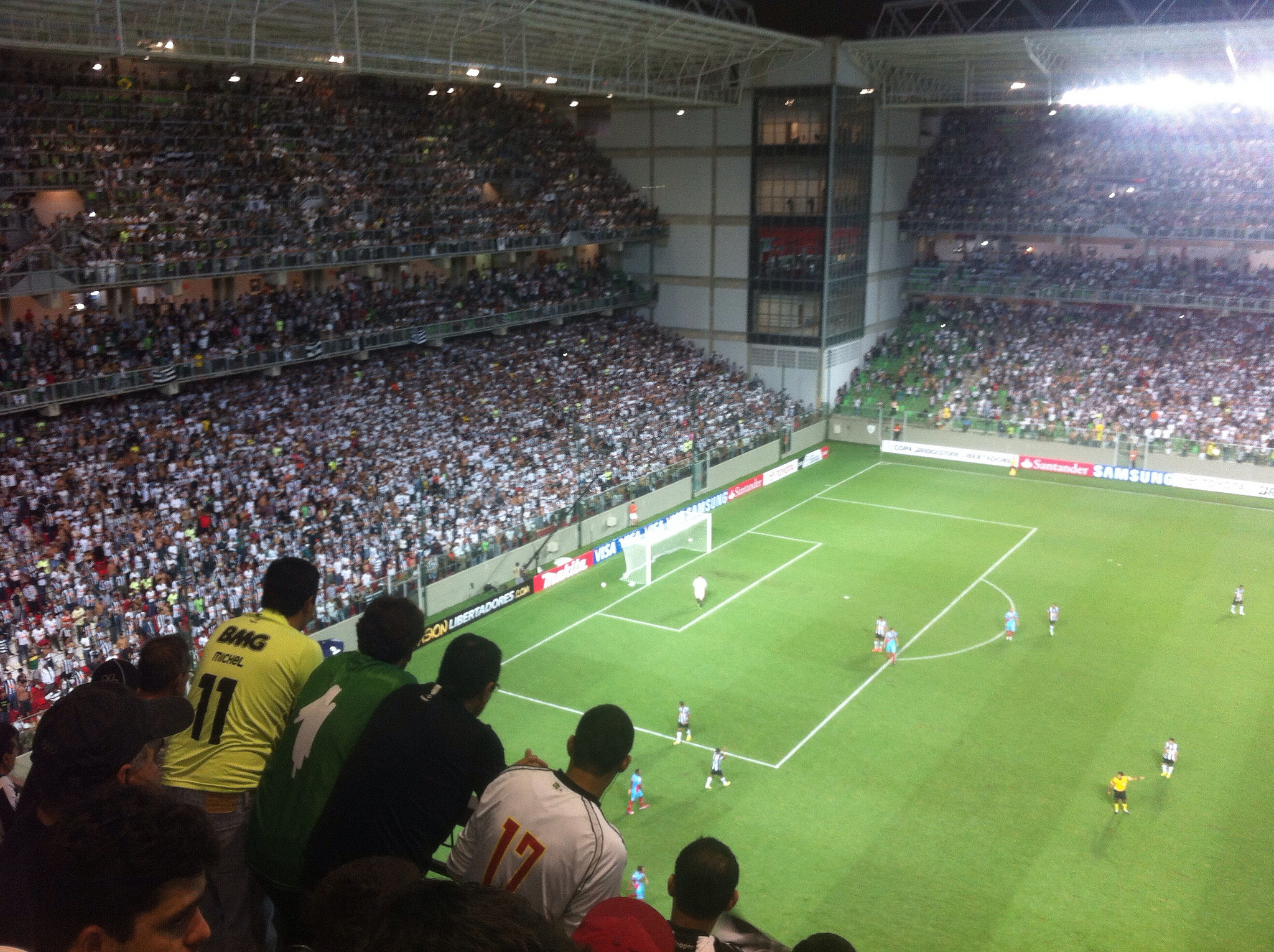 Atlético-MG x Arsenal de Sarandí, Copa Libertadores de 2013.